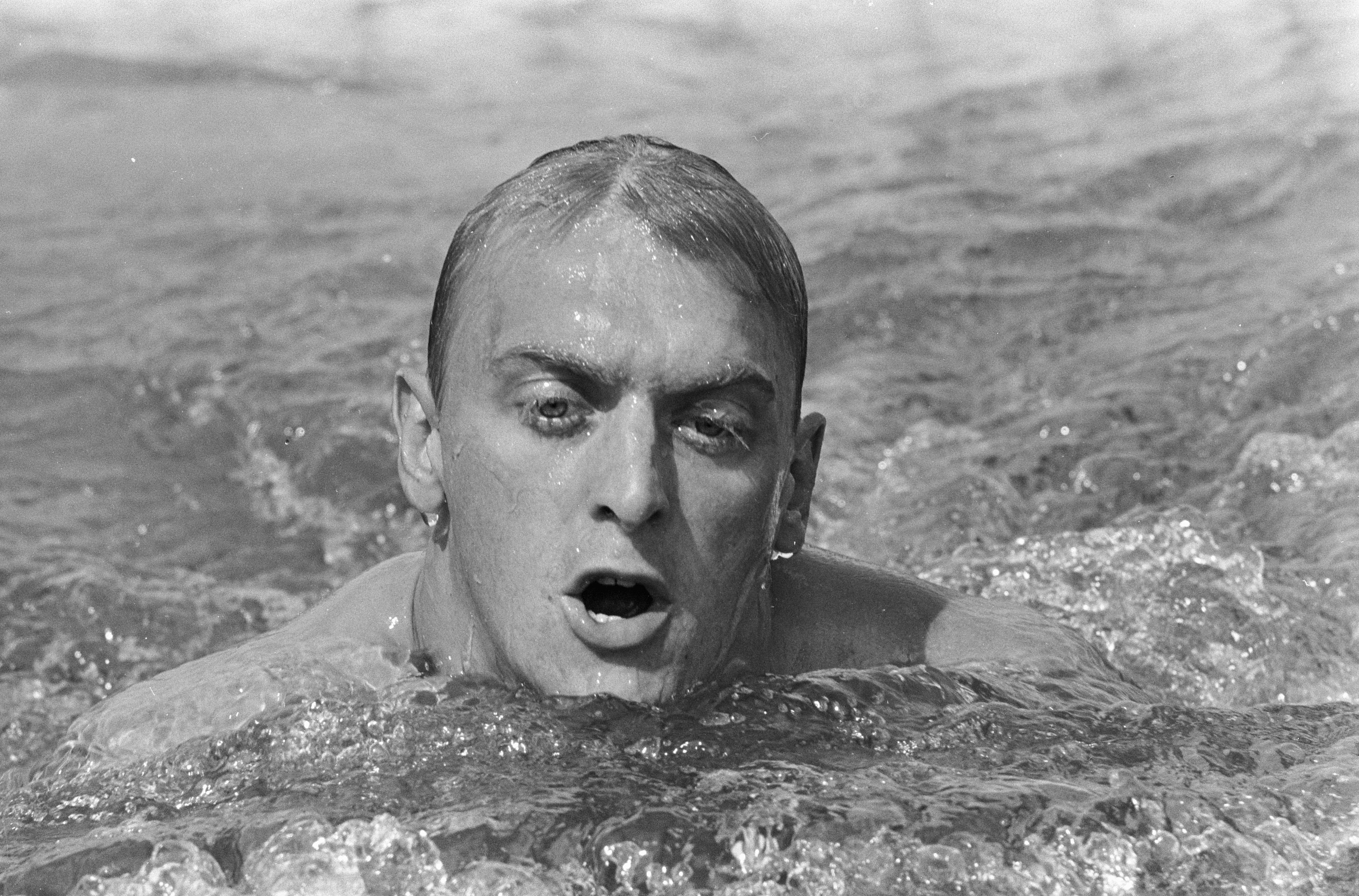 Collectie / Archief : Fotocollectie Anefo Reportage / Serie : [ onbekend ] Beschrijving : Zweminterland Nederland tegen Hongarije te Oldenzaal. Wieger Mensonides in aktie Datum : 23 juli 1967 Locatie : Oldenzaal, Overijssel Trefwoorden : sport, zwemmen Persoonsnaam : Mensonides, Wieger Fotograaf : Kroon, Ron / Anefo Auteursrechthebbende : Nationaal Archief Materiaalsoort : Negatief (zwart/wit) Nummer archiefinventaris : bekijk toegang 2.24.01.05 Bestanddeelnummer : 920-5294